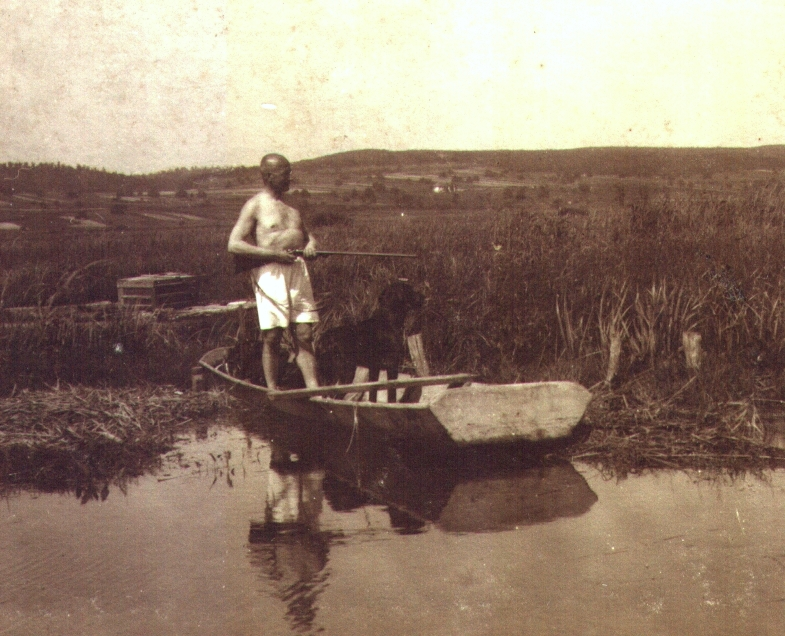 Breuer György a Fertőn, Fertőrákos